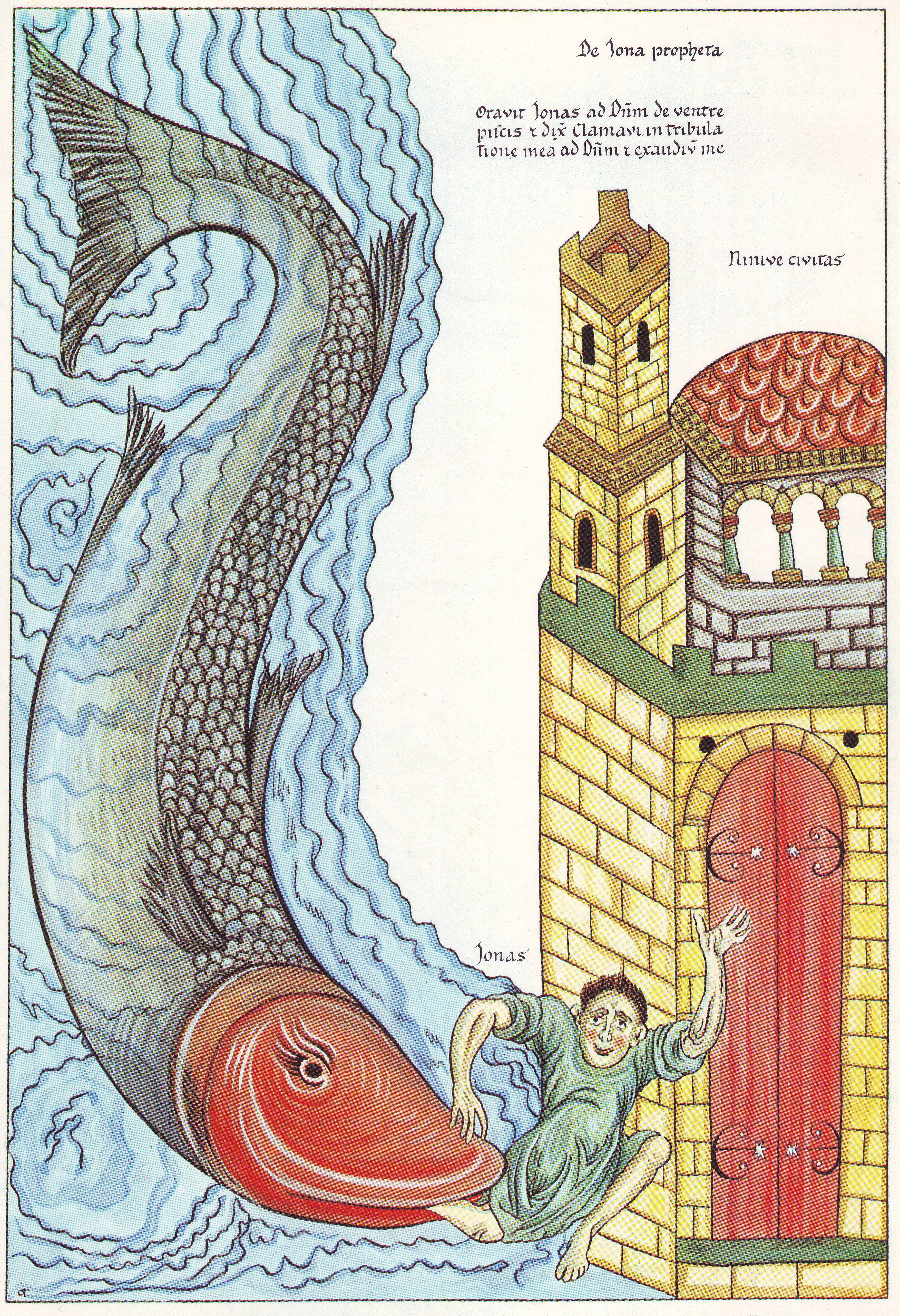 Hortus Deliciarum, Der Prophet Jonas wird vom Fisch bei Ninive ausgespien